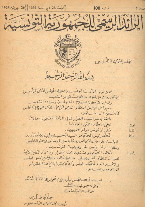 La Déclaration de la République comme paru dans le JORT le 26 Juillet 1957, Tunisie